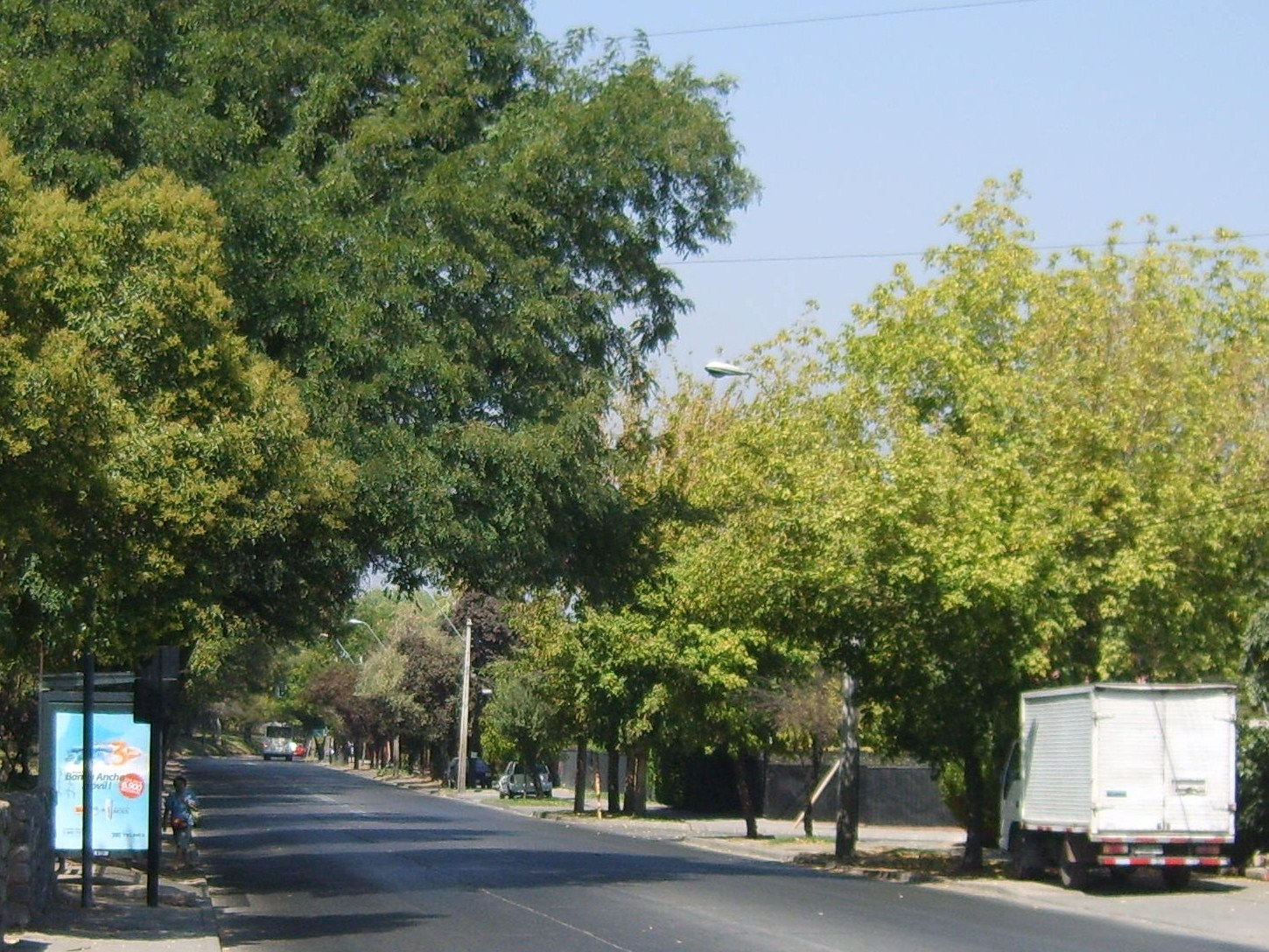 La avenida Tobalaba a la altura del 6700, comuna de La Reina, Santiago de Chile.